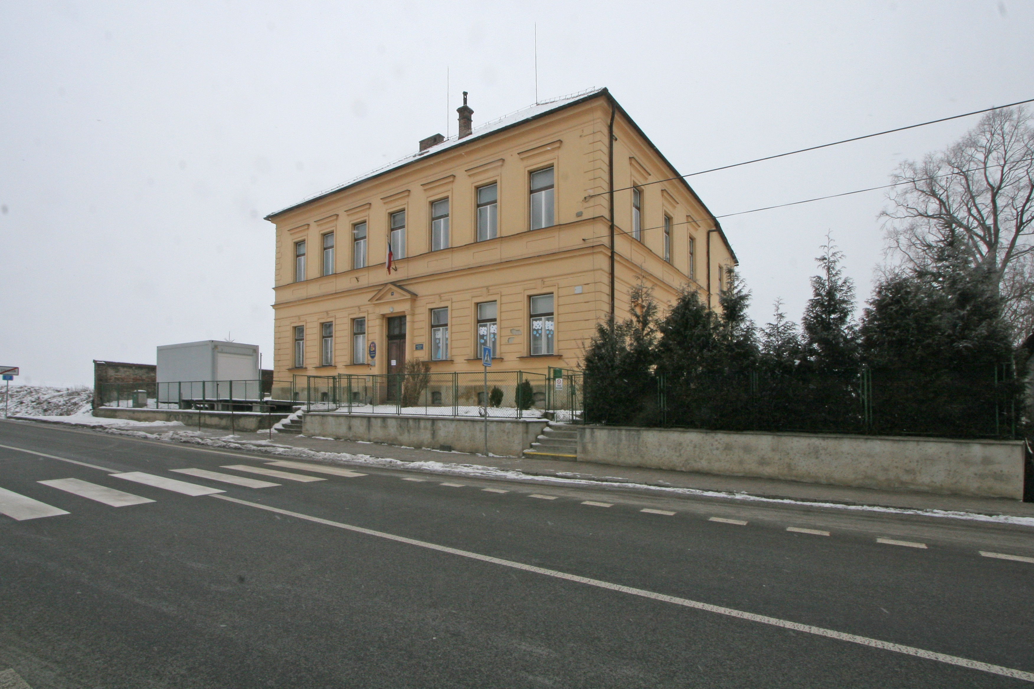 Stradouň obecní úřad